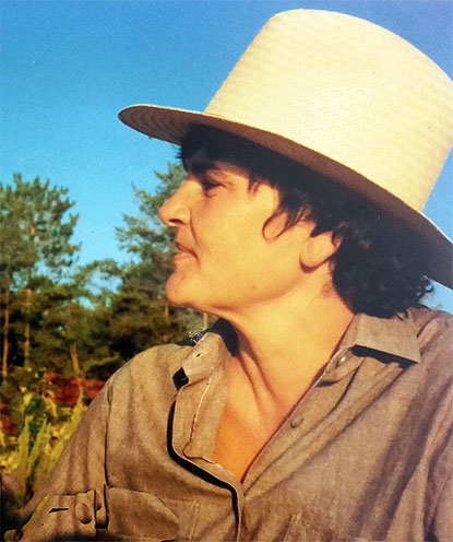 Angelika Meissner in Toronto 1991